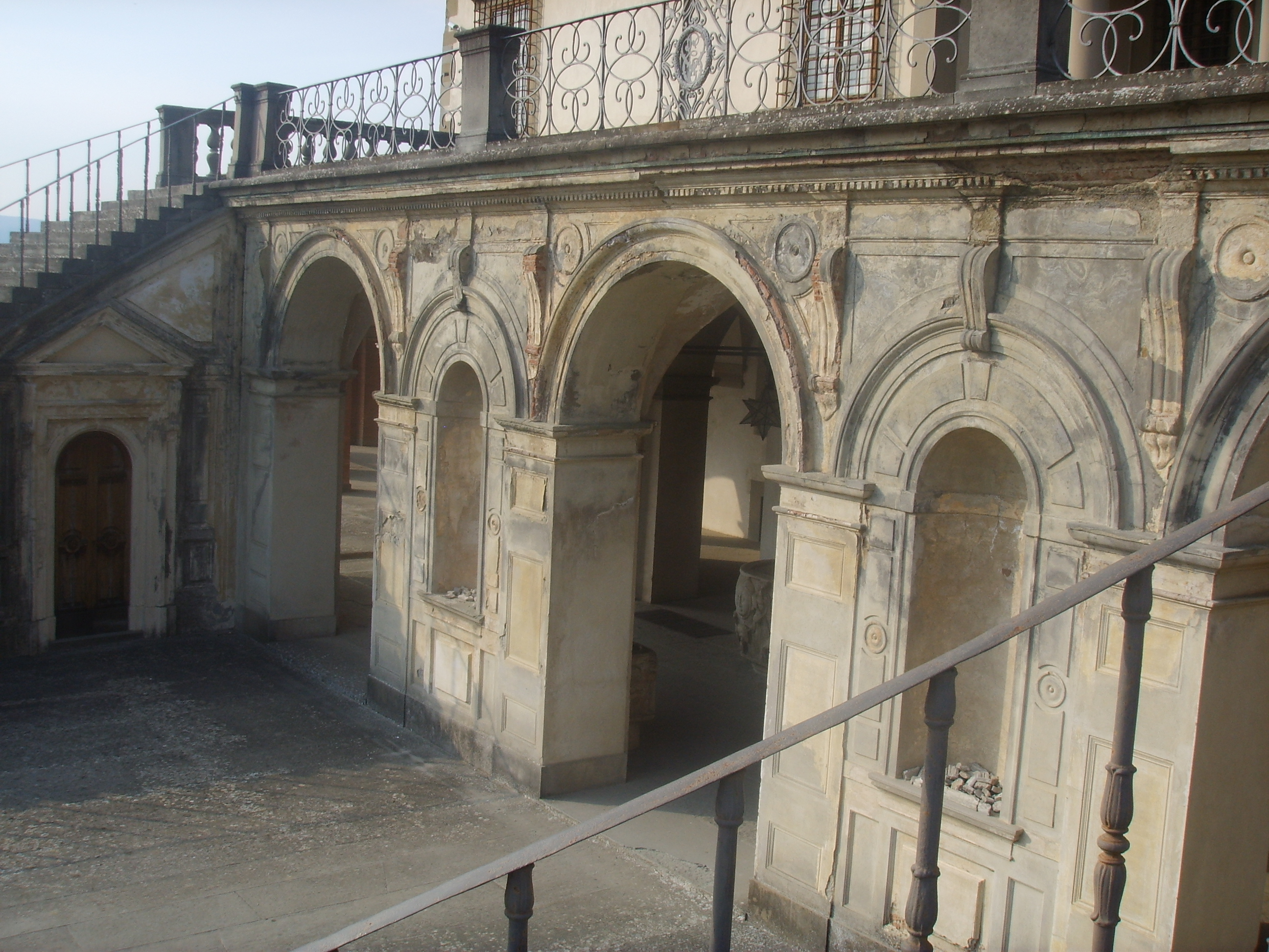 Poggio a Caiano Villa outside view in Poggio a Caiano, Italy